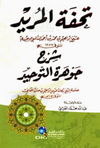 كتاب تحفة المريد شرح جوهرة التوحيد